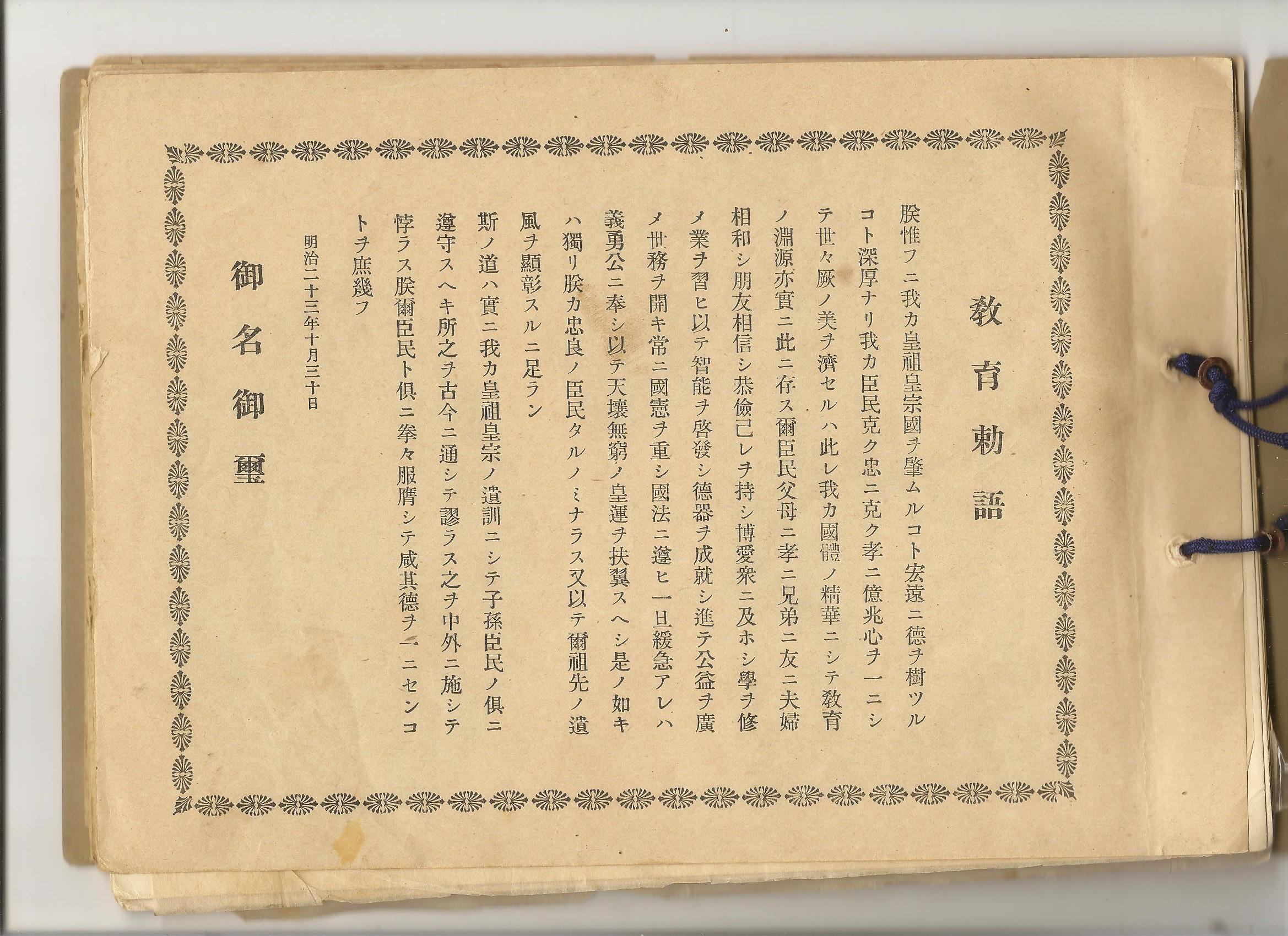 大日本帝國明治天皇《教育敕語》。翻攝自《堀江國民學校第一回修了紀念帖》內頁（1942年3月發給今臺北市萬華區雙園國民小學畢業生）。